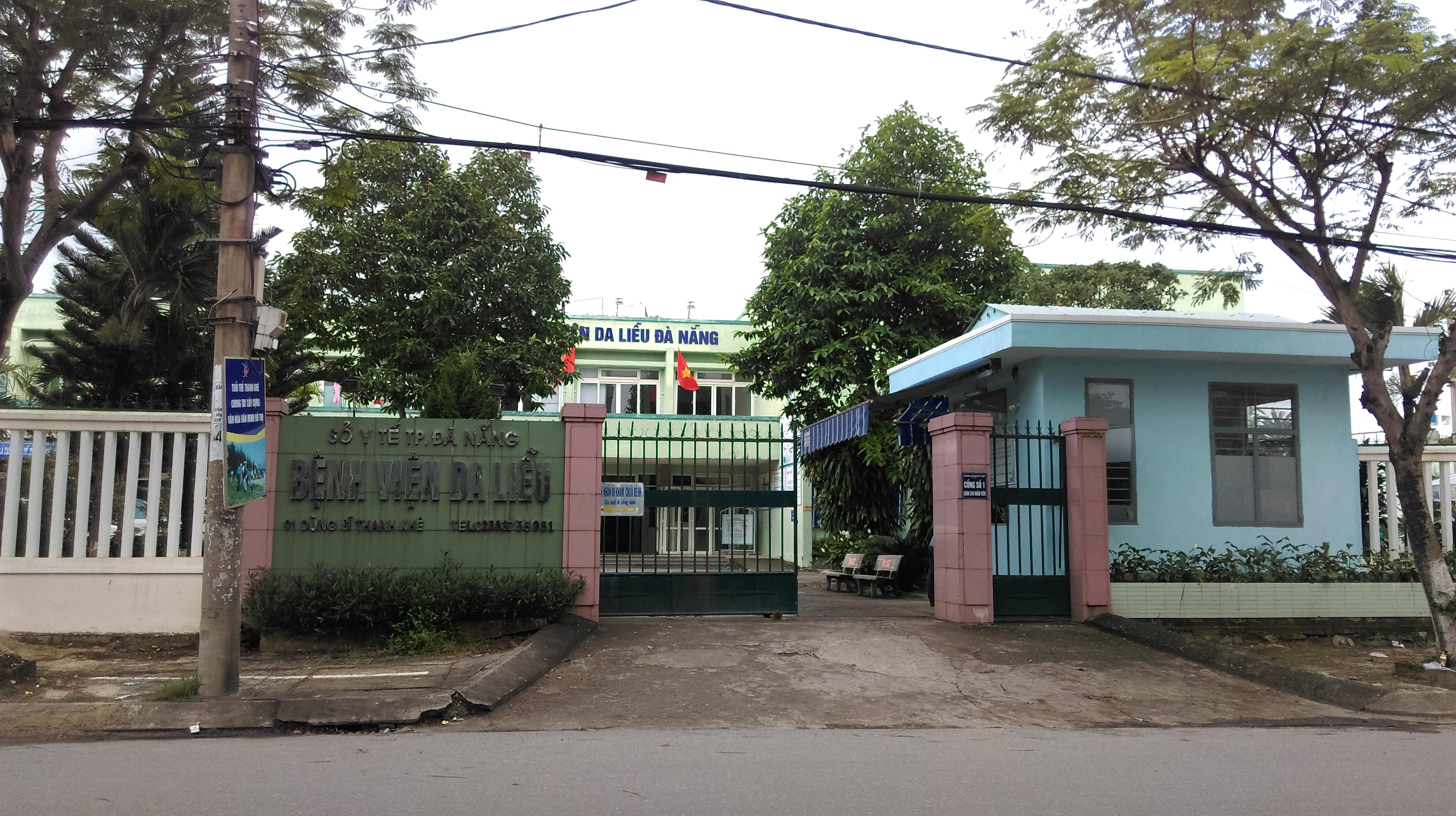 Bệnh viện Da liễu, Đà Nẵng